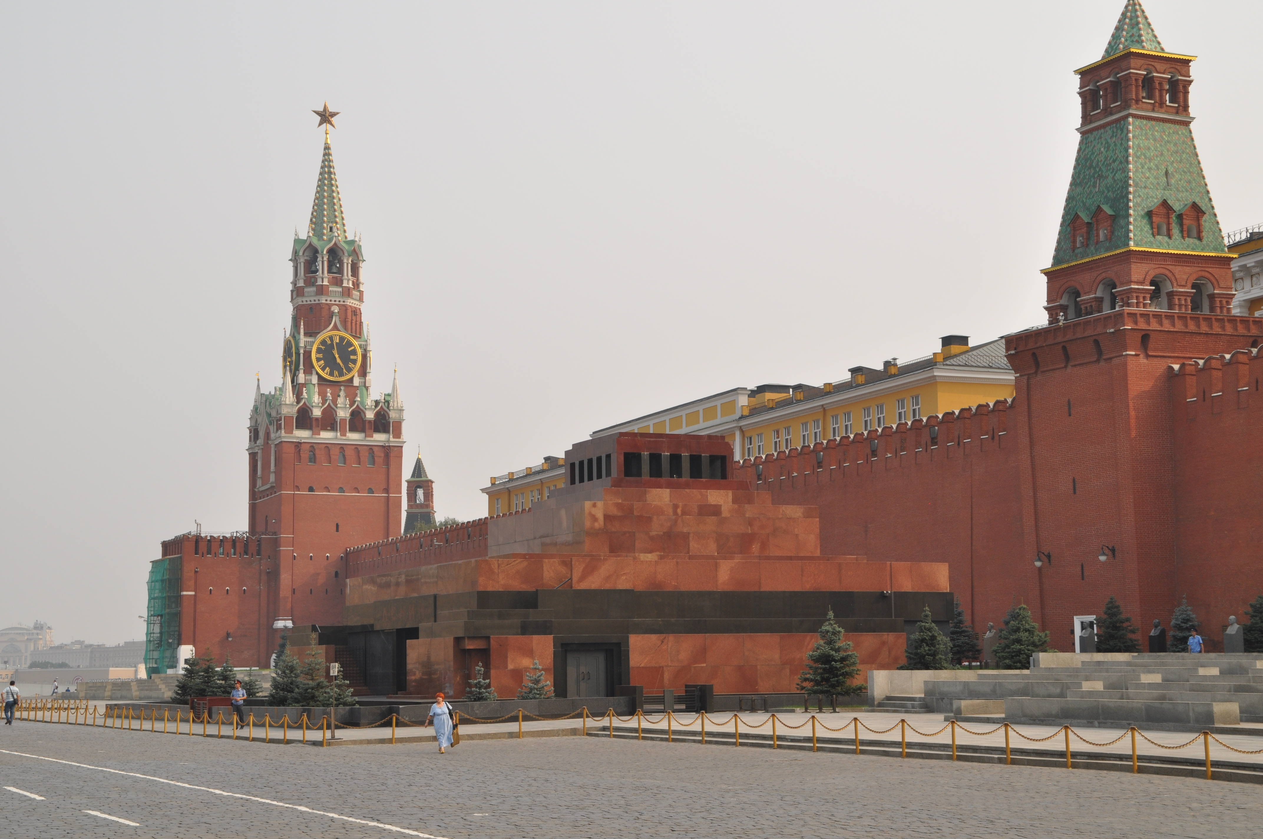 Kreml Moskau, Roter Platz